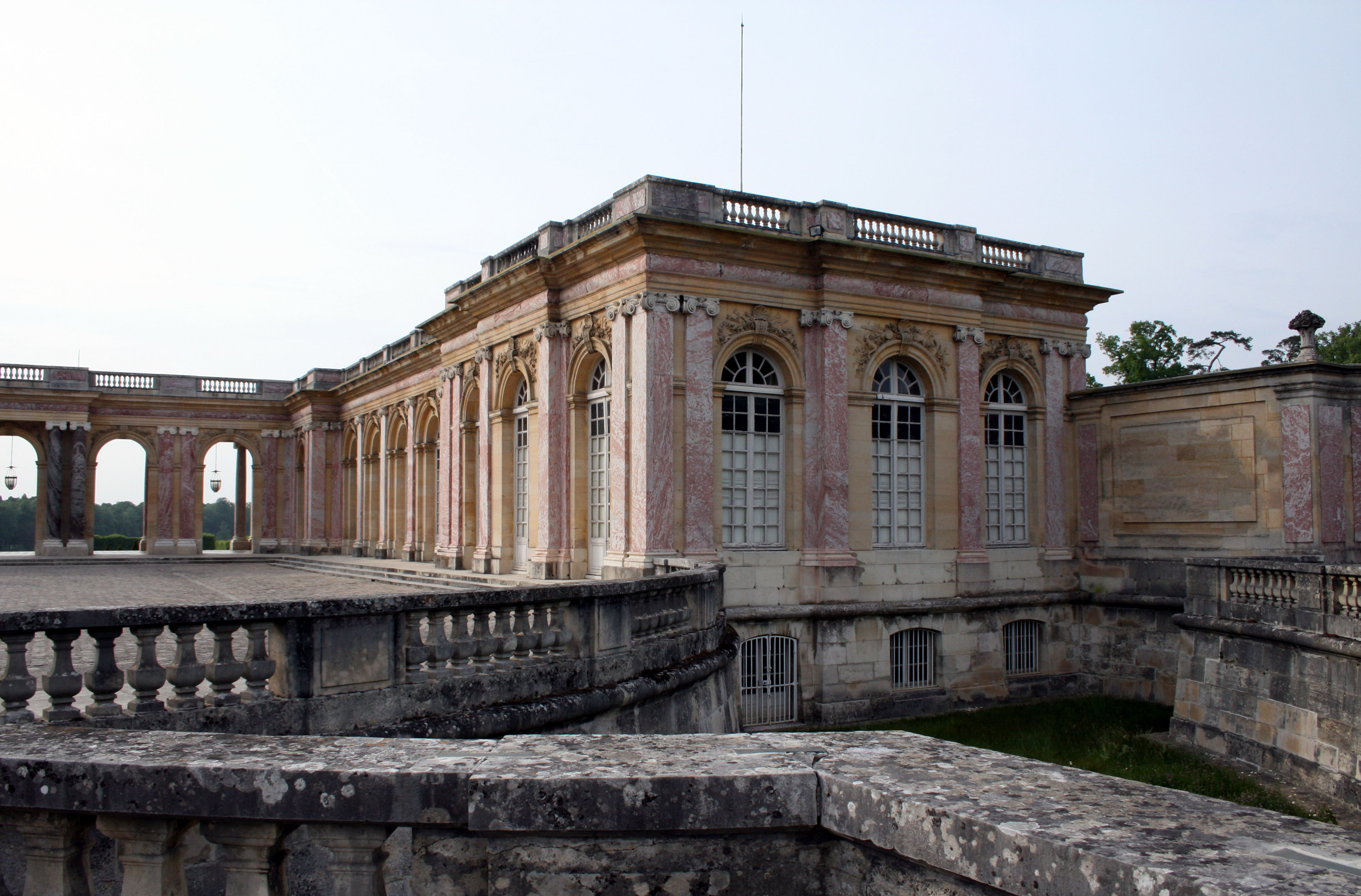 Grand Trianon de Versailles